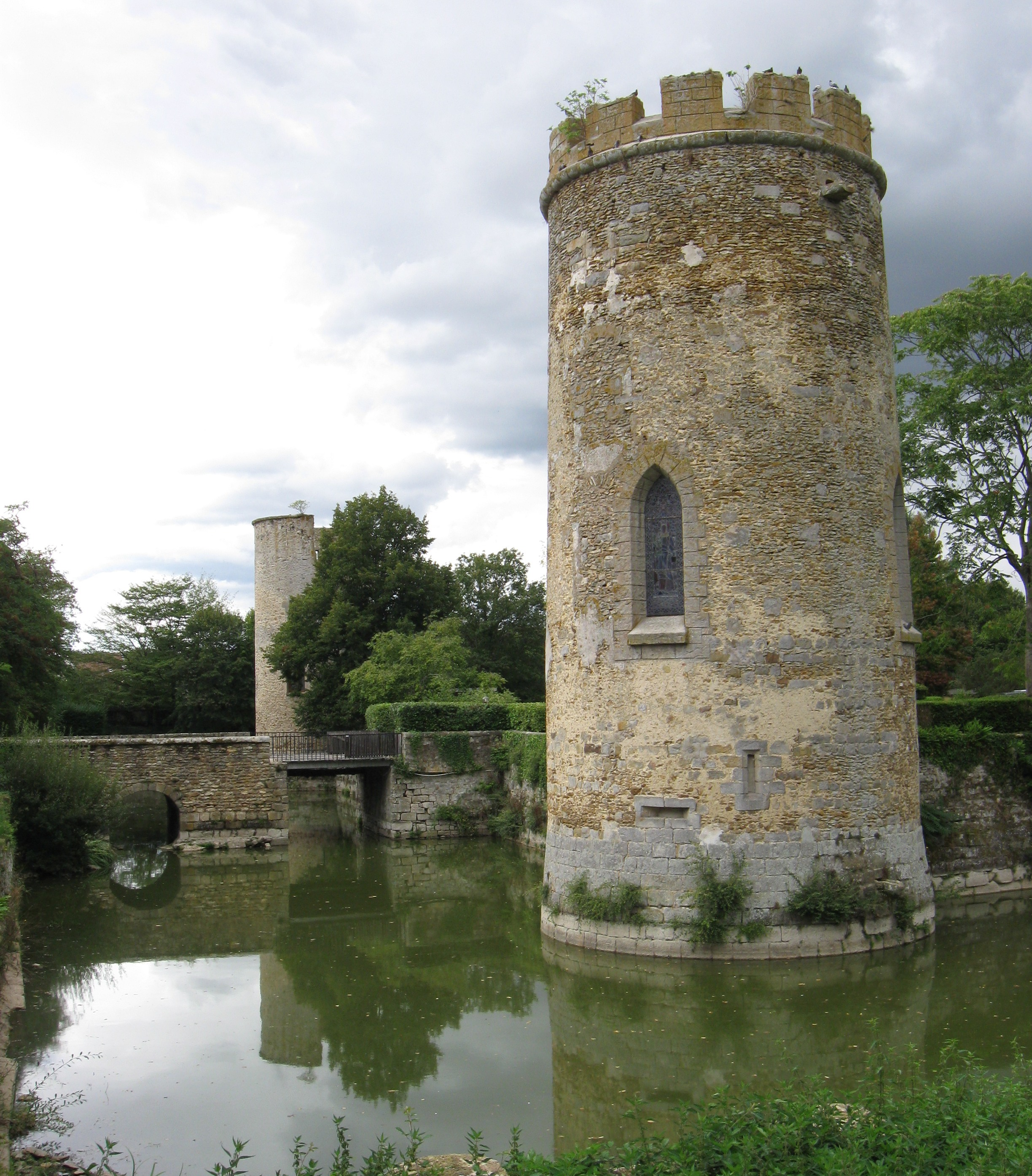 Douves de l'ancien château de Châtillon-la-Borde. (Seine-et-Marne, région Île-de-France).